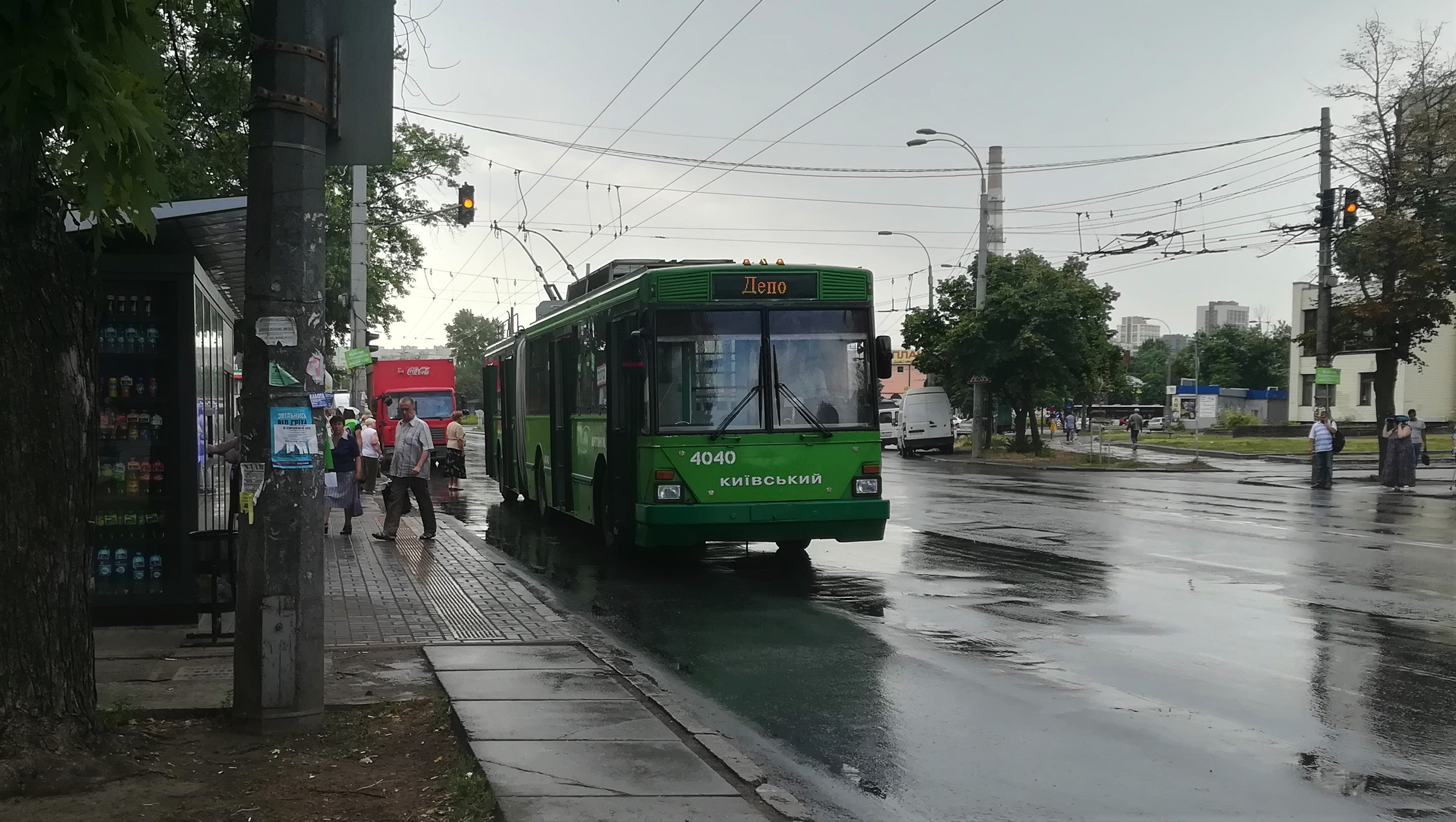 Тролейбус Київ-12.03 №4040 на кінцевій зупинці "проспект Свободи" у Києві (маршрут 24, їде у депо)